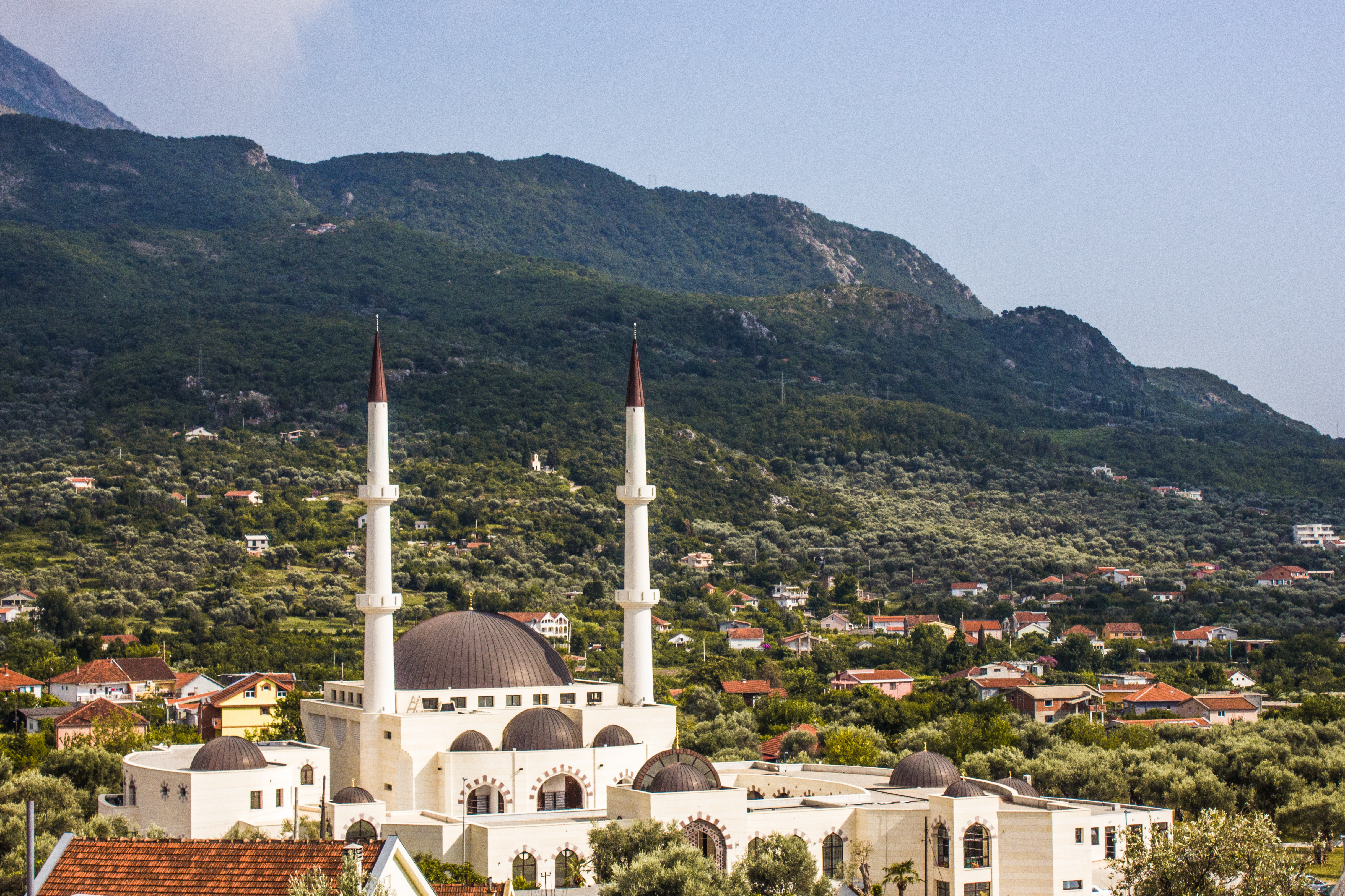 Мечеть - Mosque